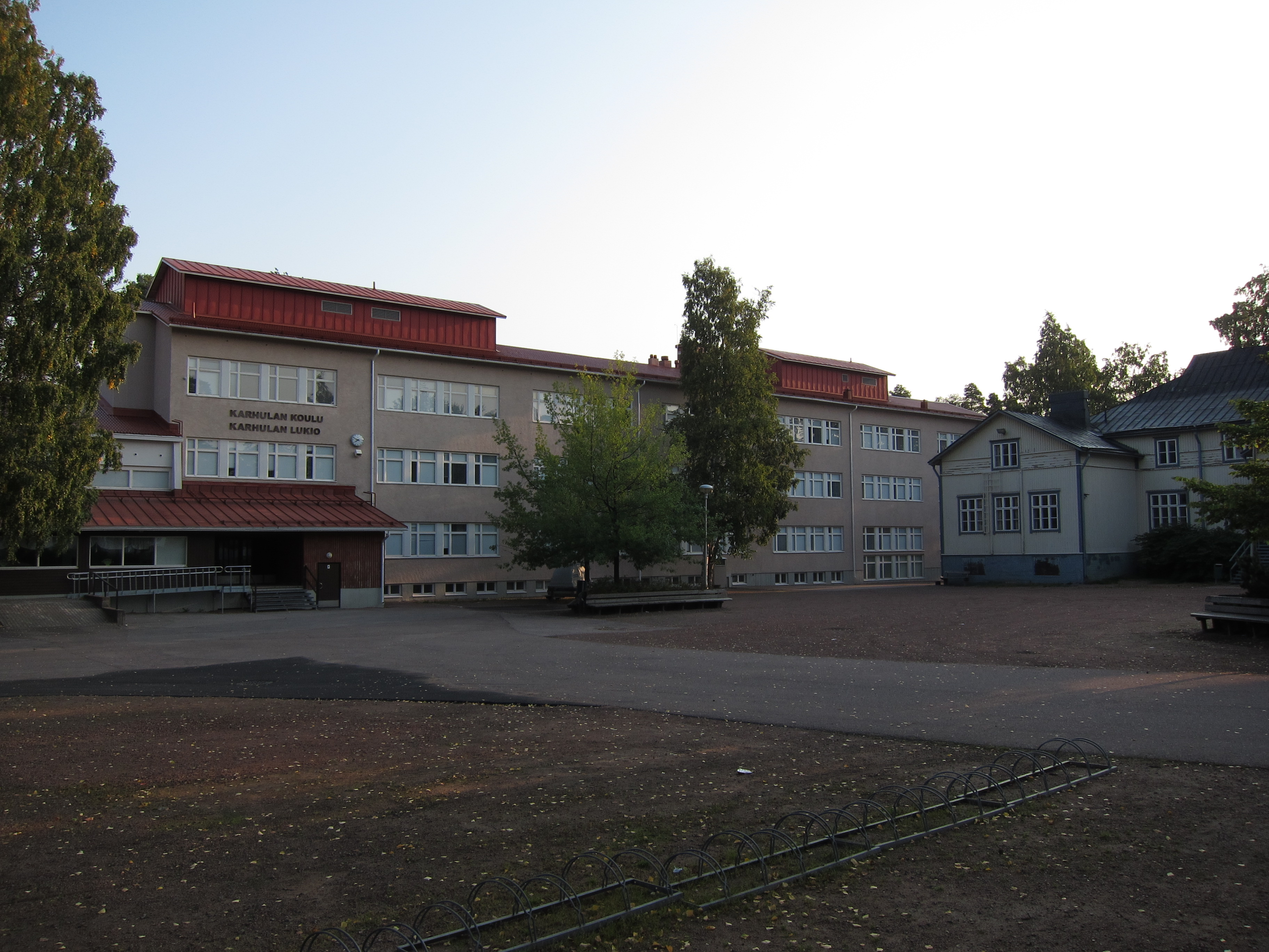 Karhulan koulu Kotkassa.